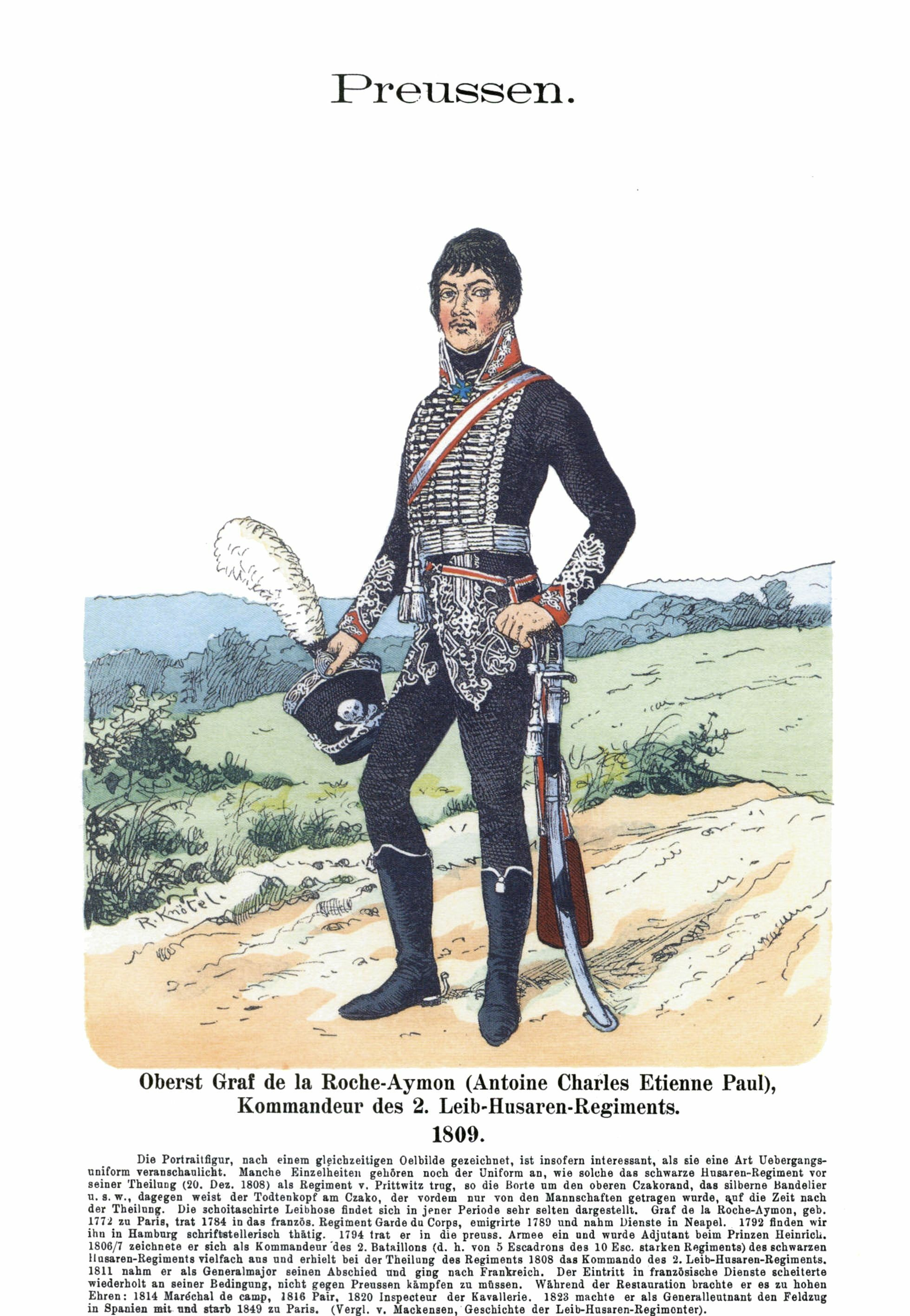 Иллюстрация Рихарда Кнотеля